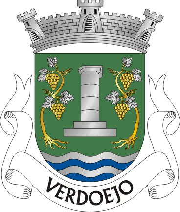 Brasão da Freguesia de Verdoejo